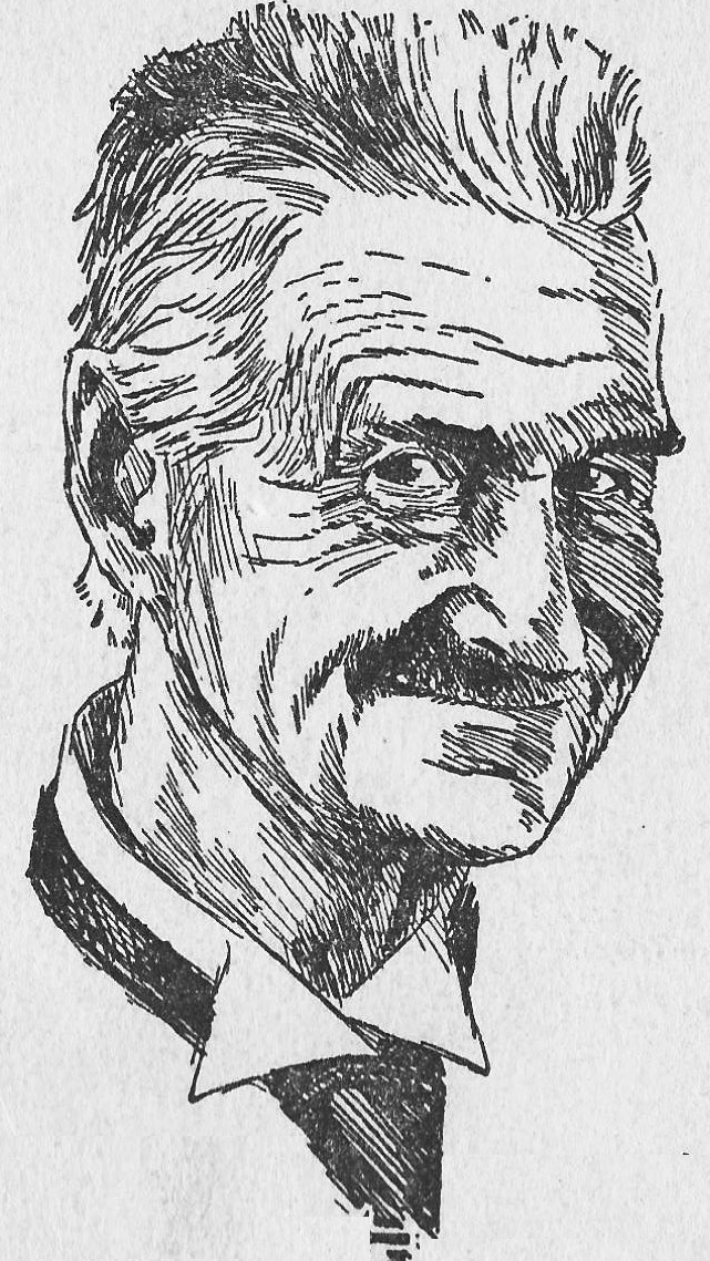 Självporträtt 1942